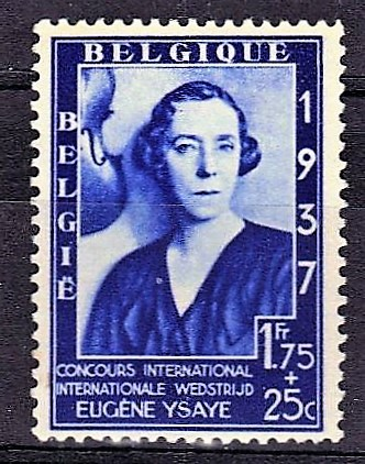 La reine Elisabeth (timbre de 1937- concours Eugène Ysaÿe).